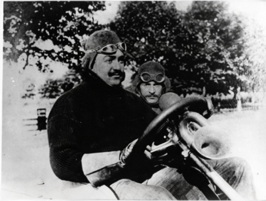 Foto a mezzo busto di Vincenzo Lancia e B. Aiassa alla guida di una vettura presso Garden City a New York in occasione del premio coppa Vanderbilt (Fiat Group Marketing & Corporate Communication spa, Archivio e centro storico Fiat, Archivio iconografico, Lancia, Foto Piloti, Corse, 31)